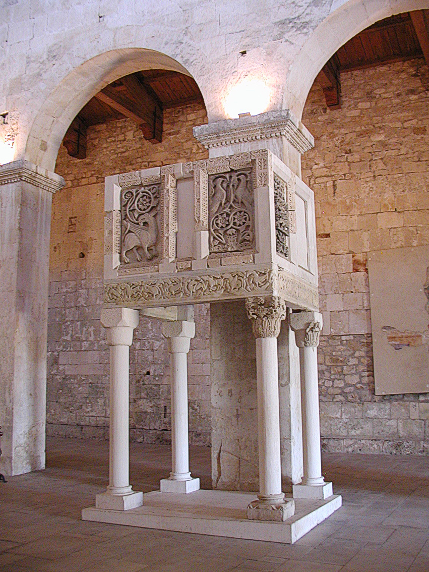 San Liberatore a Majella